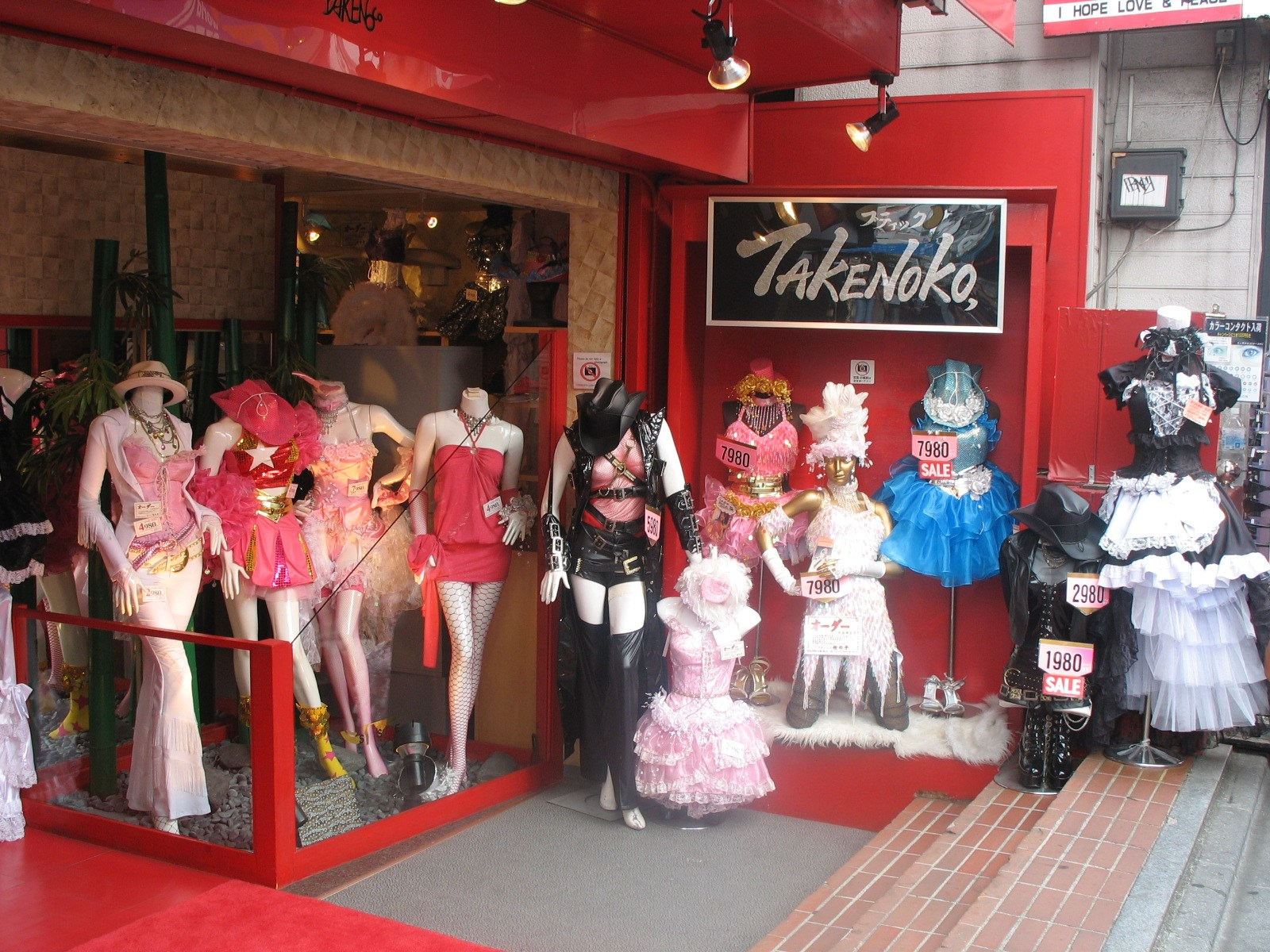 Une boutique typique de la rue Takeshita-dori